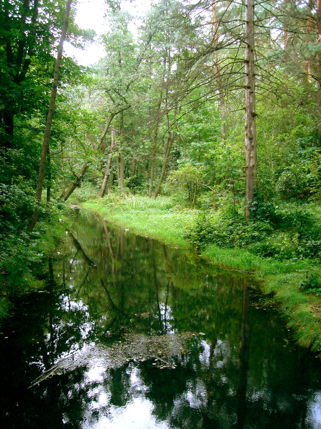 Rzeka Czarka.